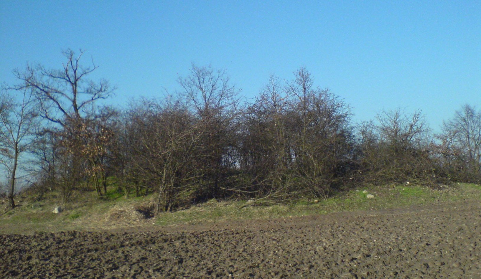 Kurhan 2 w Łękach Małych - Wielkopolskie piramidy